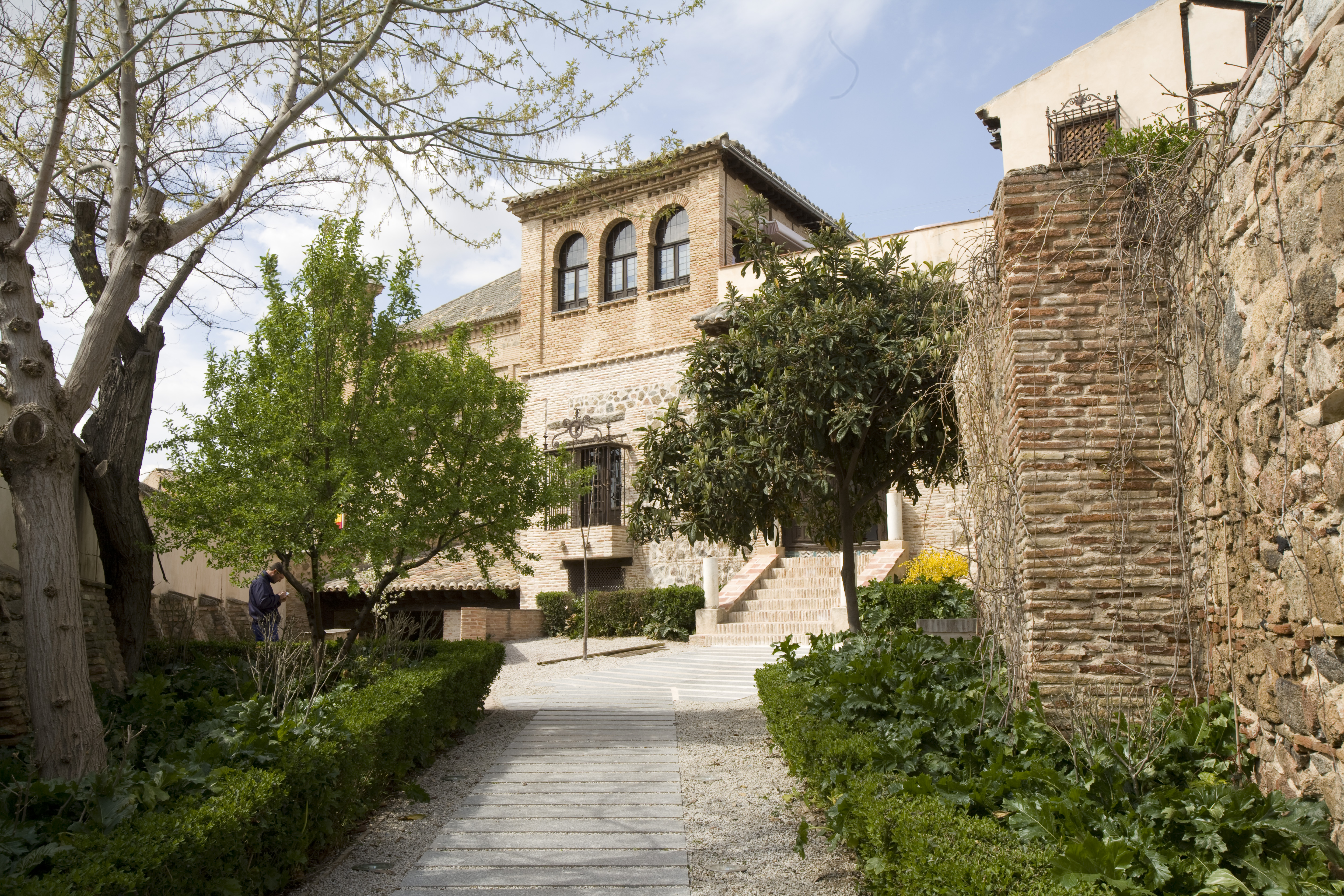 Vista del camino que lleva a la entrada a la casa, primera parte del recorrido